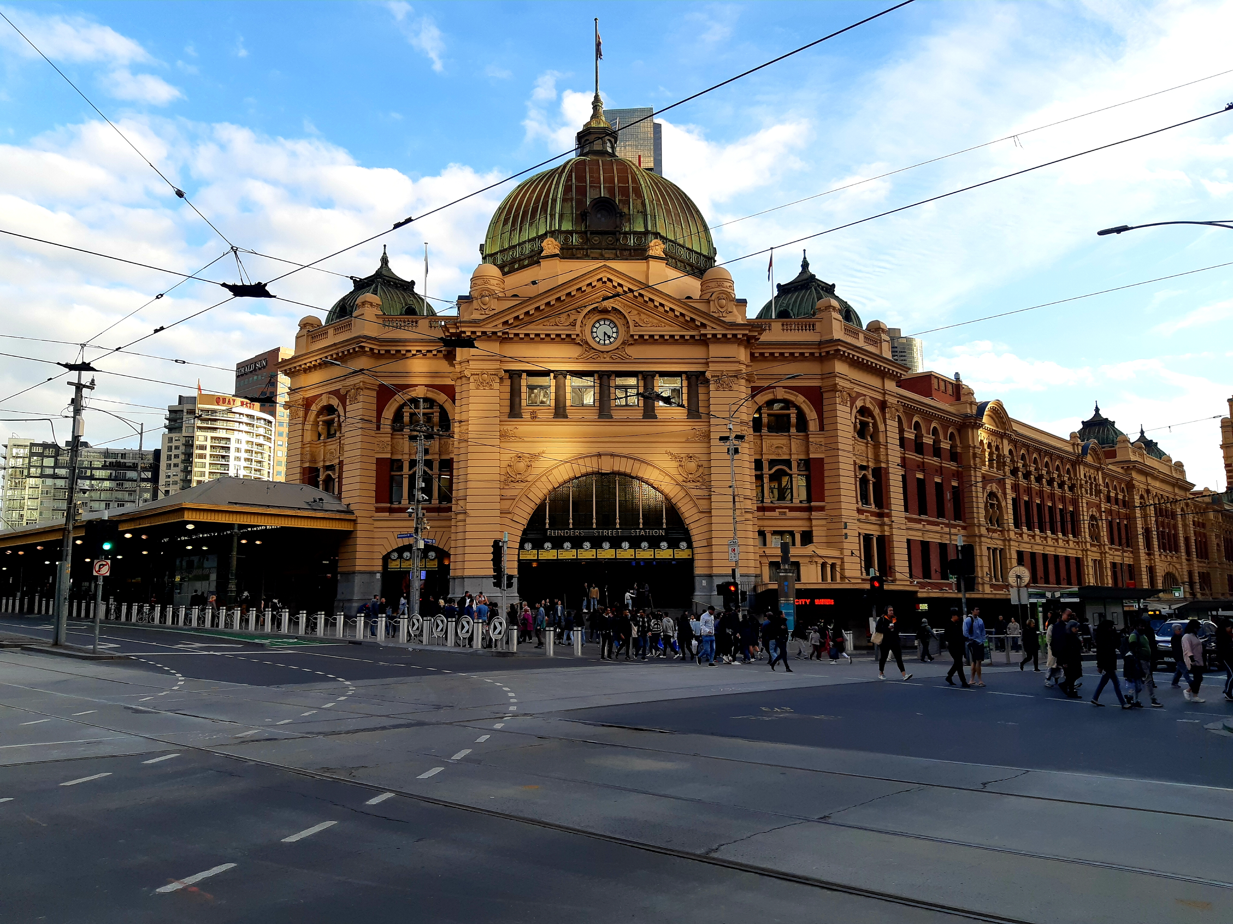 Bangunan dan pintu utama Stasiun kereta api Flinders Street, Melbourne